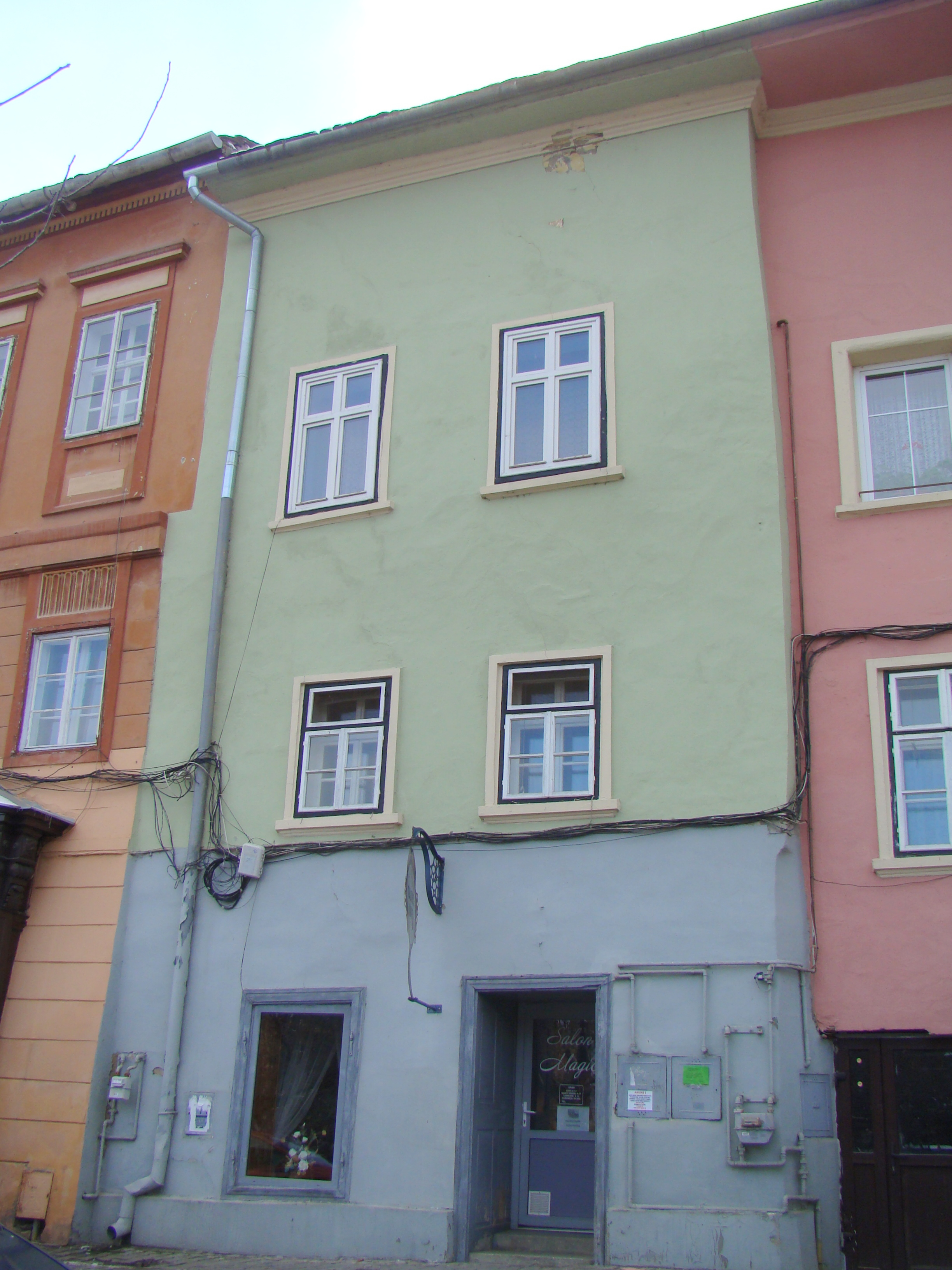 Casa Ungar, municipiul Sighișoara, Piața Oberth Hermann 46 sec. XVII, sec. XIX